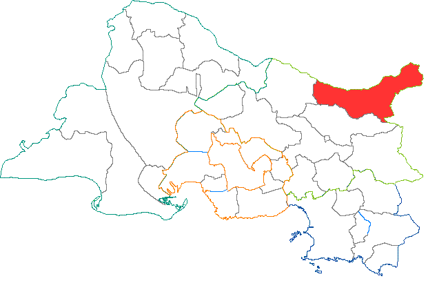 Situation du canton dans le département des Bouches du Rhône (France)